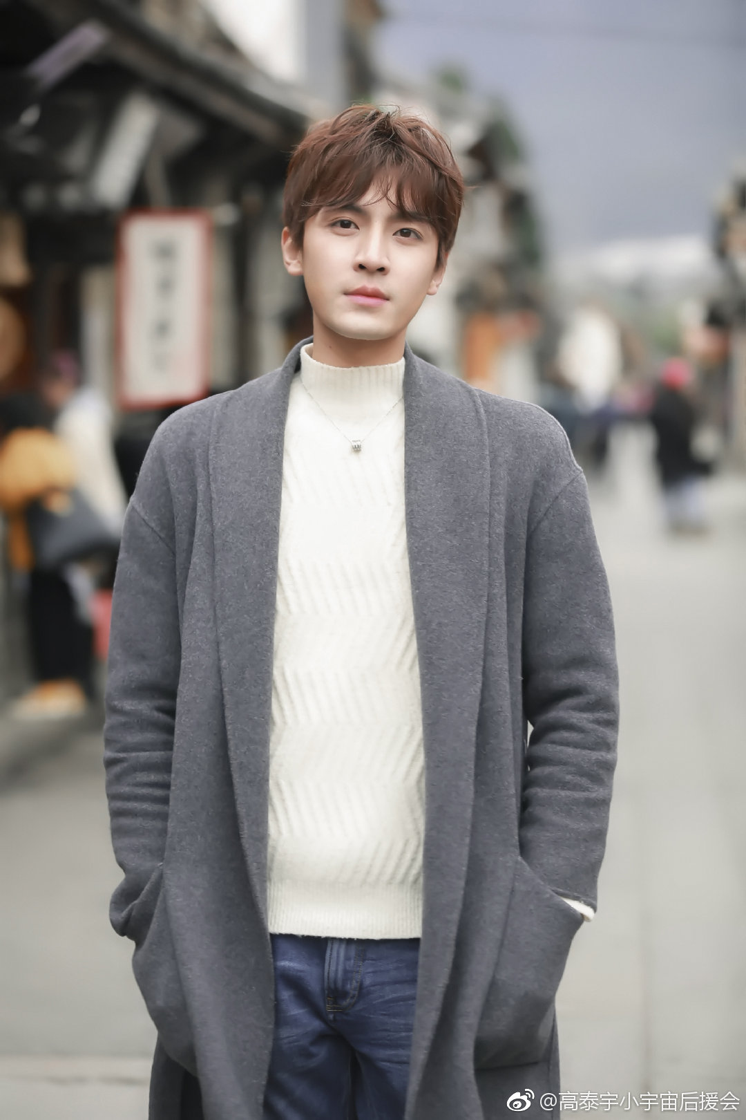 Chân dung Cao Thái Vũ